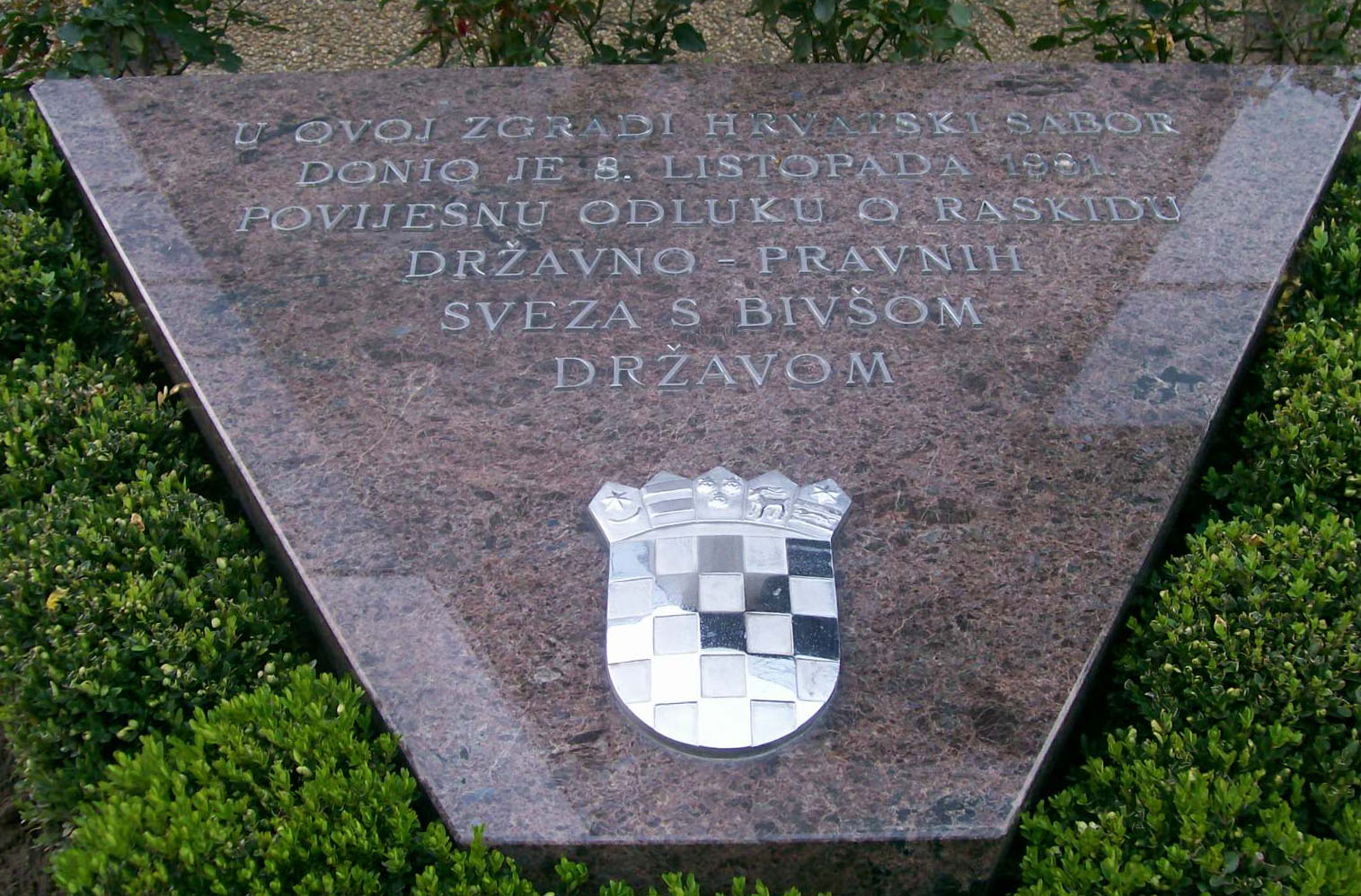 Spomen ploča na 8.10.1991. ispred INA-ine zgrade u Šubićevoj, Zagreb